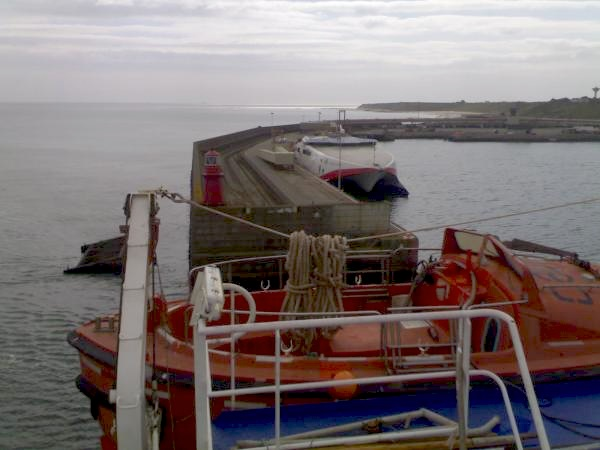 Rosslare\Roslare_Europort.jpg Gavigan avec GIMP 2006 /2007